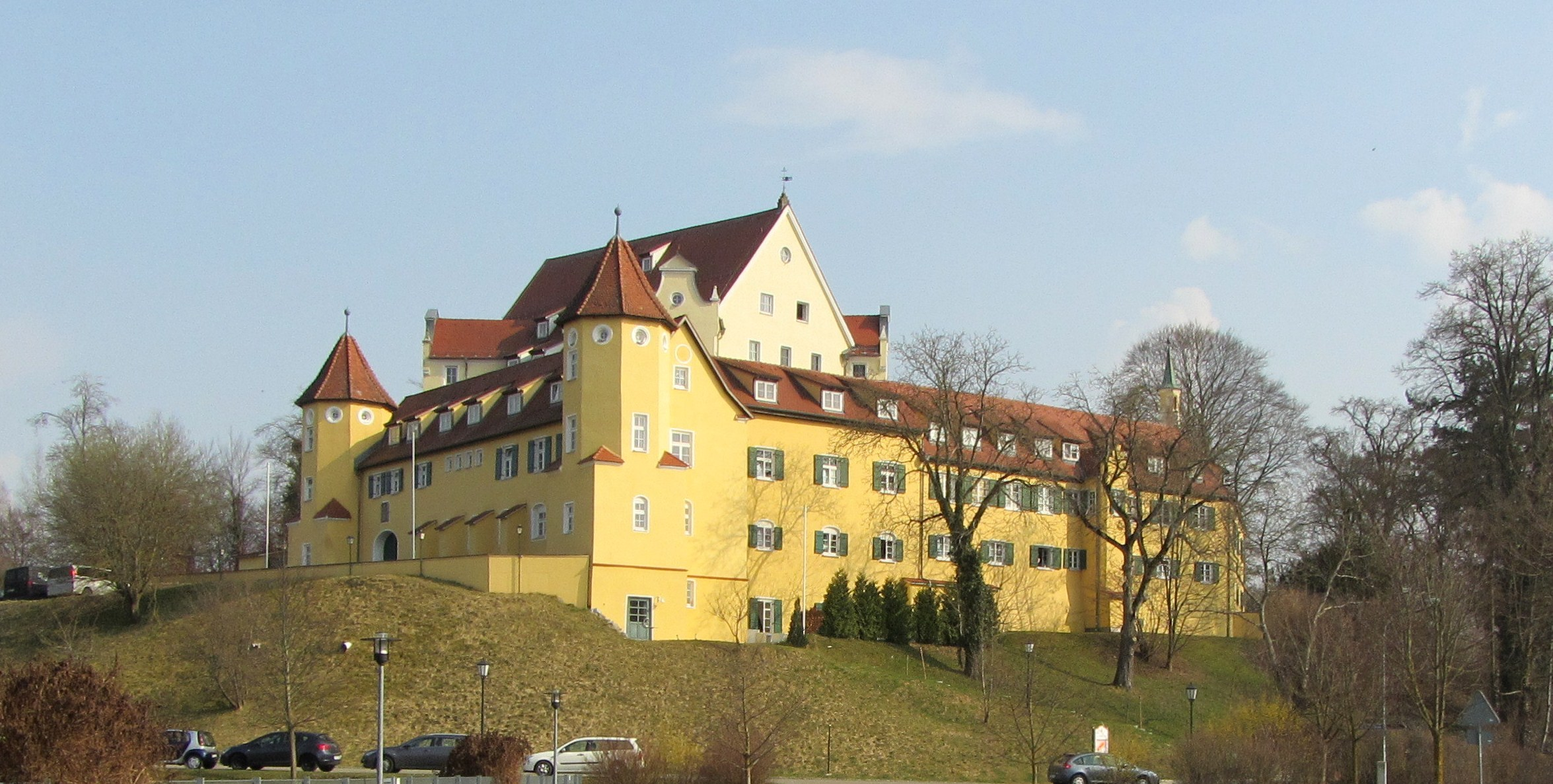 Erolzheimer Schloss